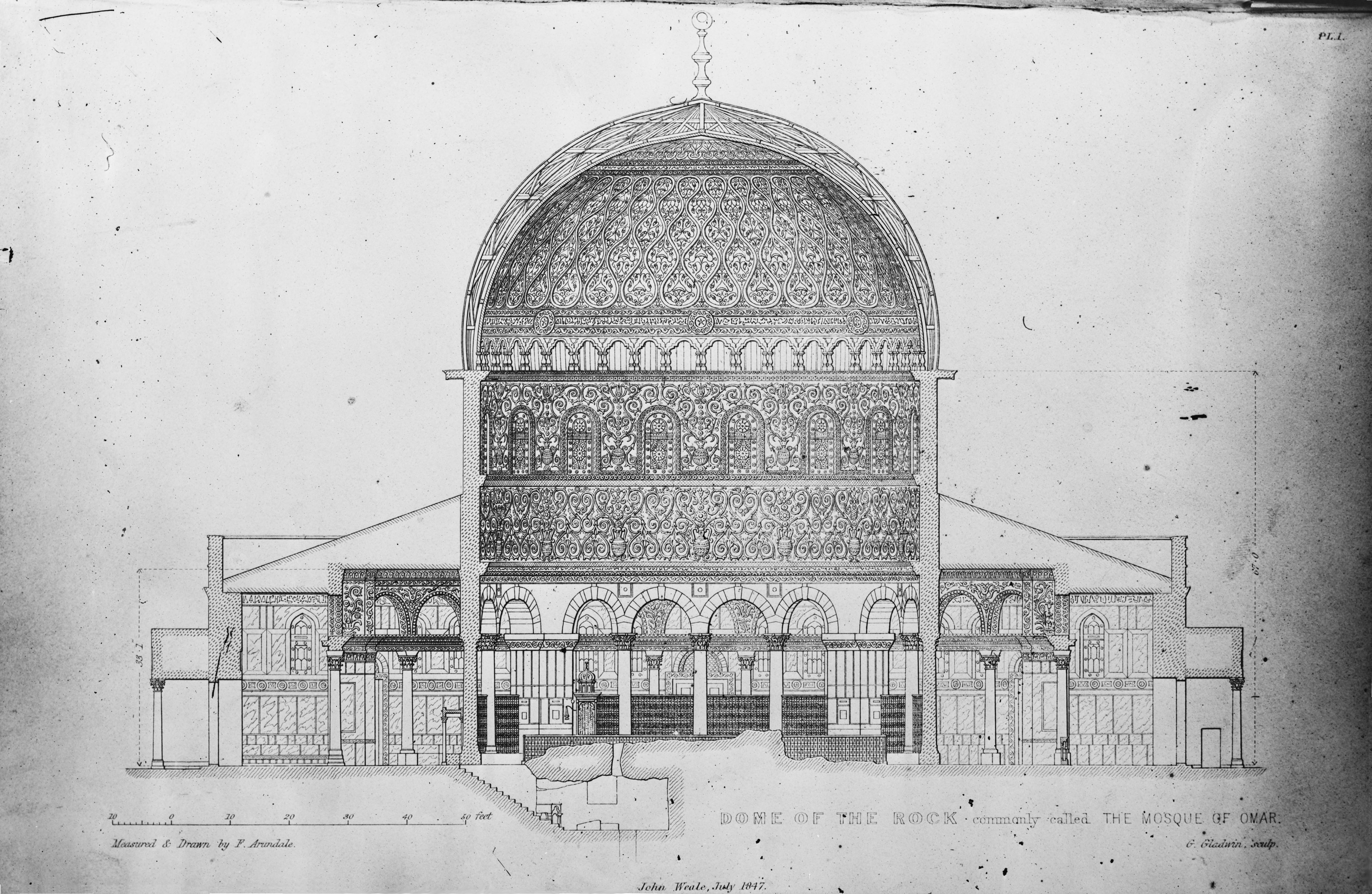 Sted: Jerusalem Kommune: Fylke: Tagger